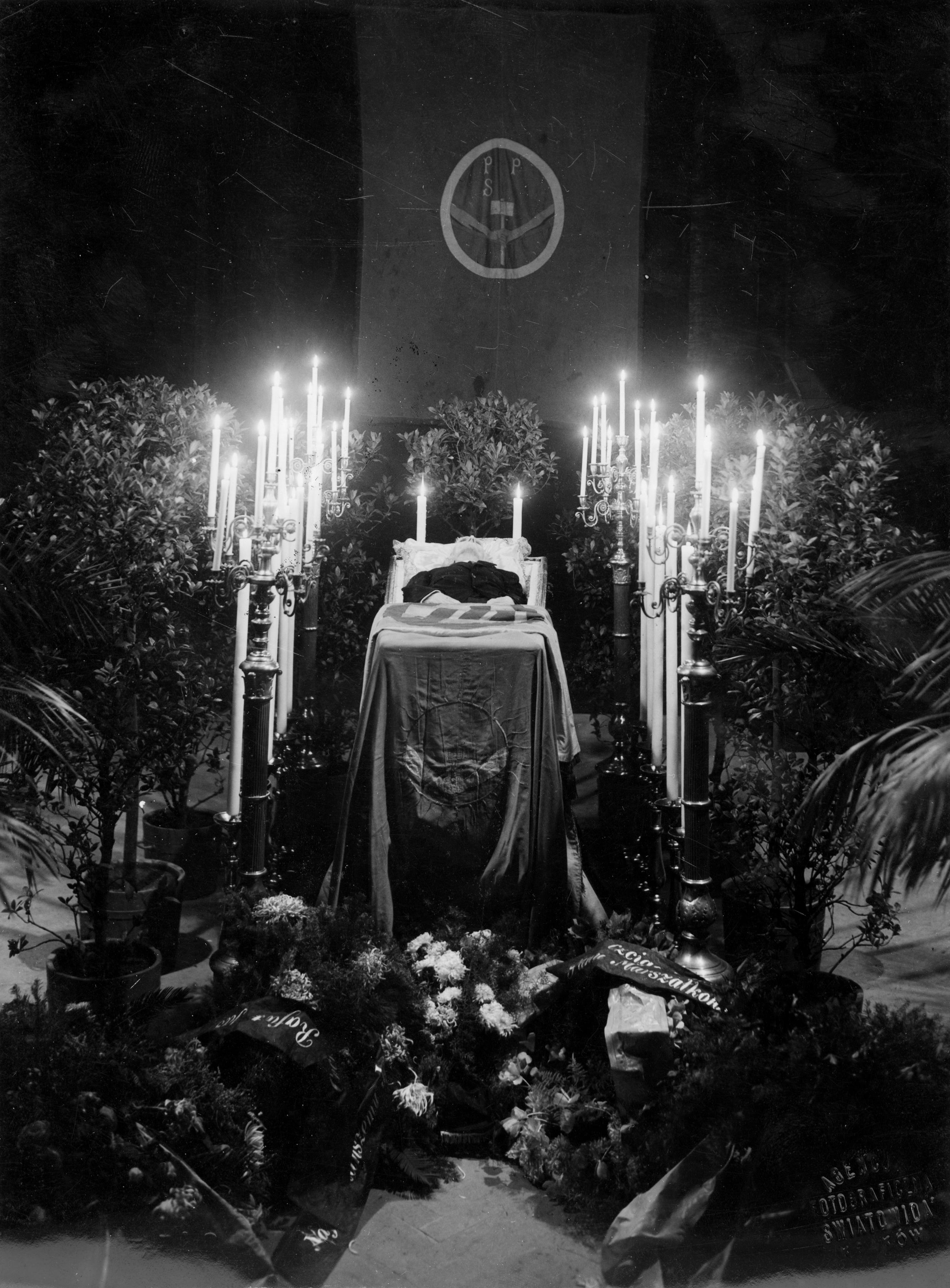 Zwłoki Ignacego Daszyńskiego na katafalku.